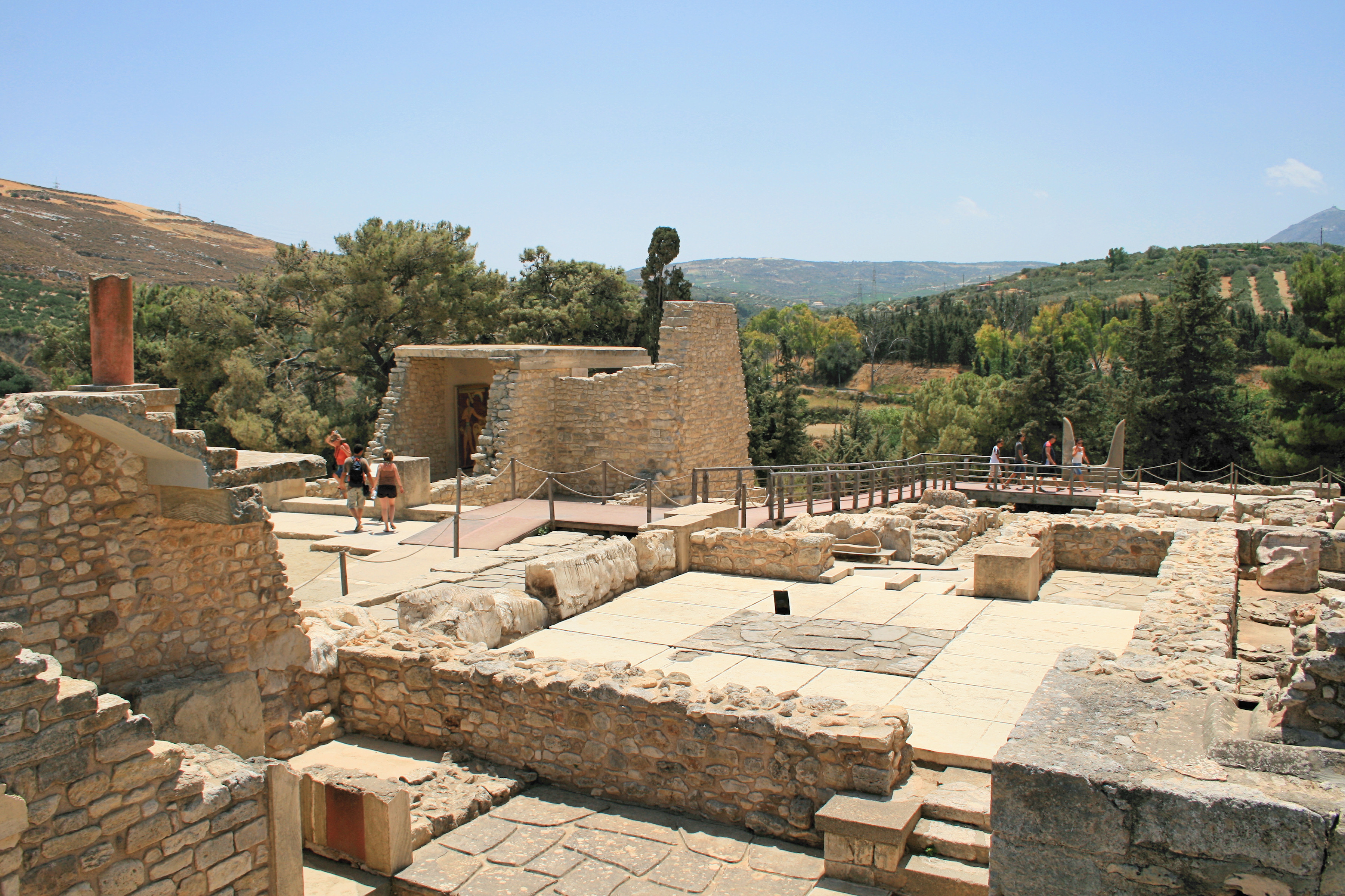 Der südöstliche Teil des ersten Obergeschosses des minoischen Palastes von Knossos auf der griechischen Insel Kreta (ganz links im Hintergrund der Berg Giouchtas bei Archanes)